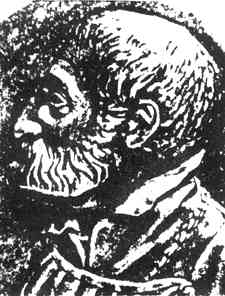 Portrait Eitelhans Langenmantel